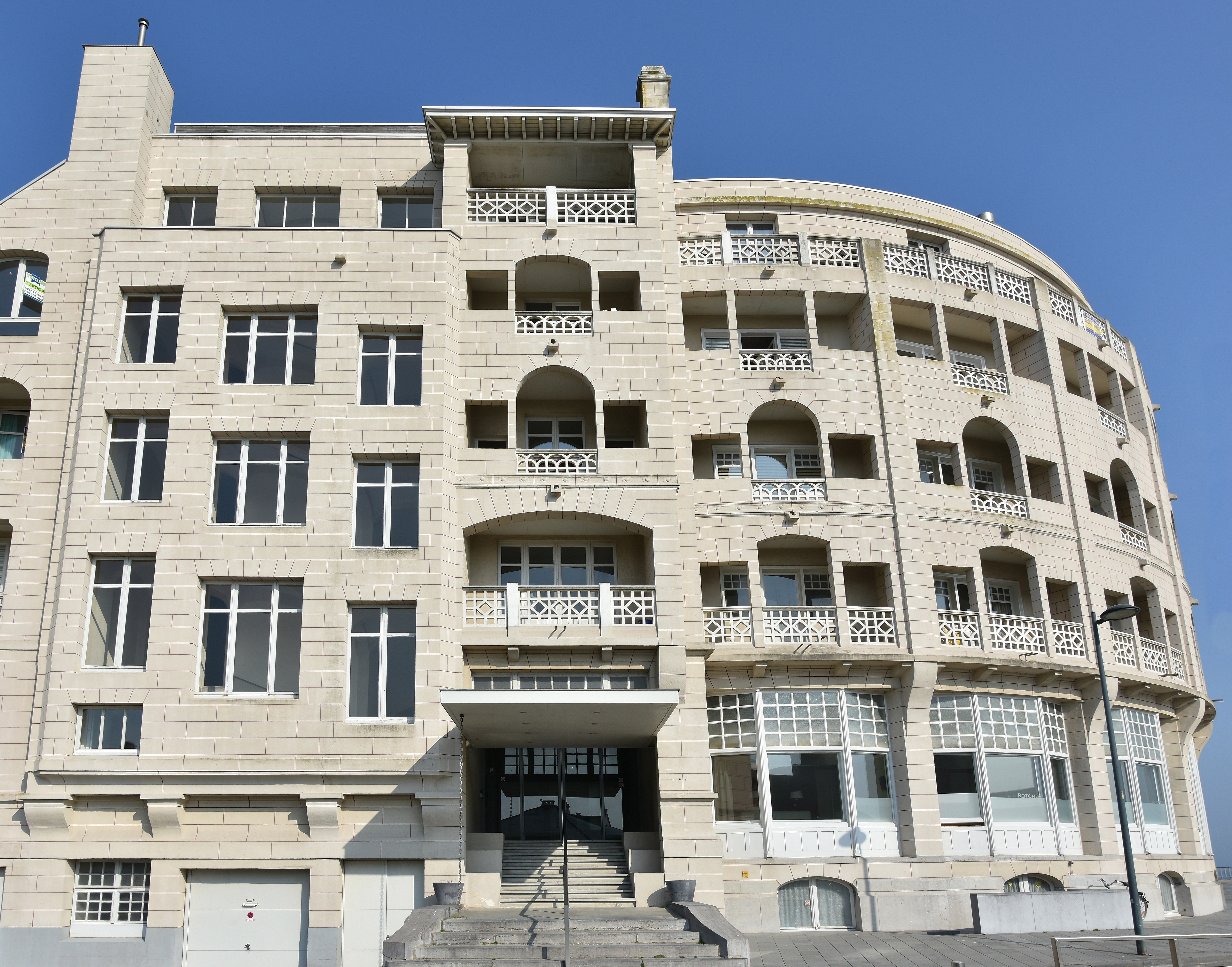 Grand Hôtel Bellevue Westende, België